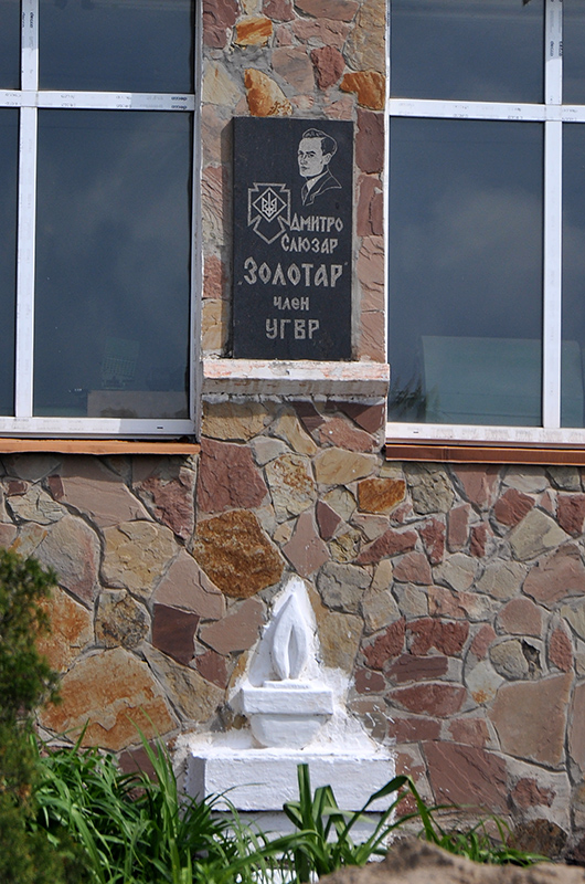 Меморіальна таблиця присвячена Дмитрові Слюзару на школі в селі Бортники.